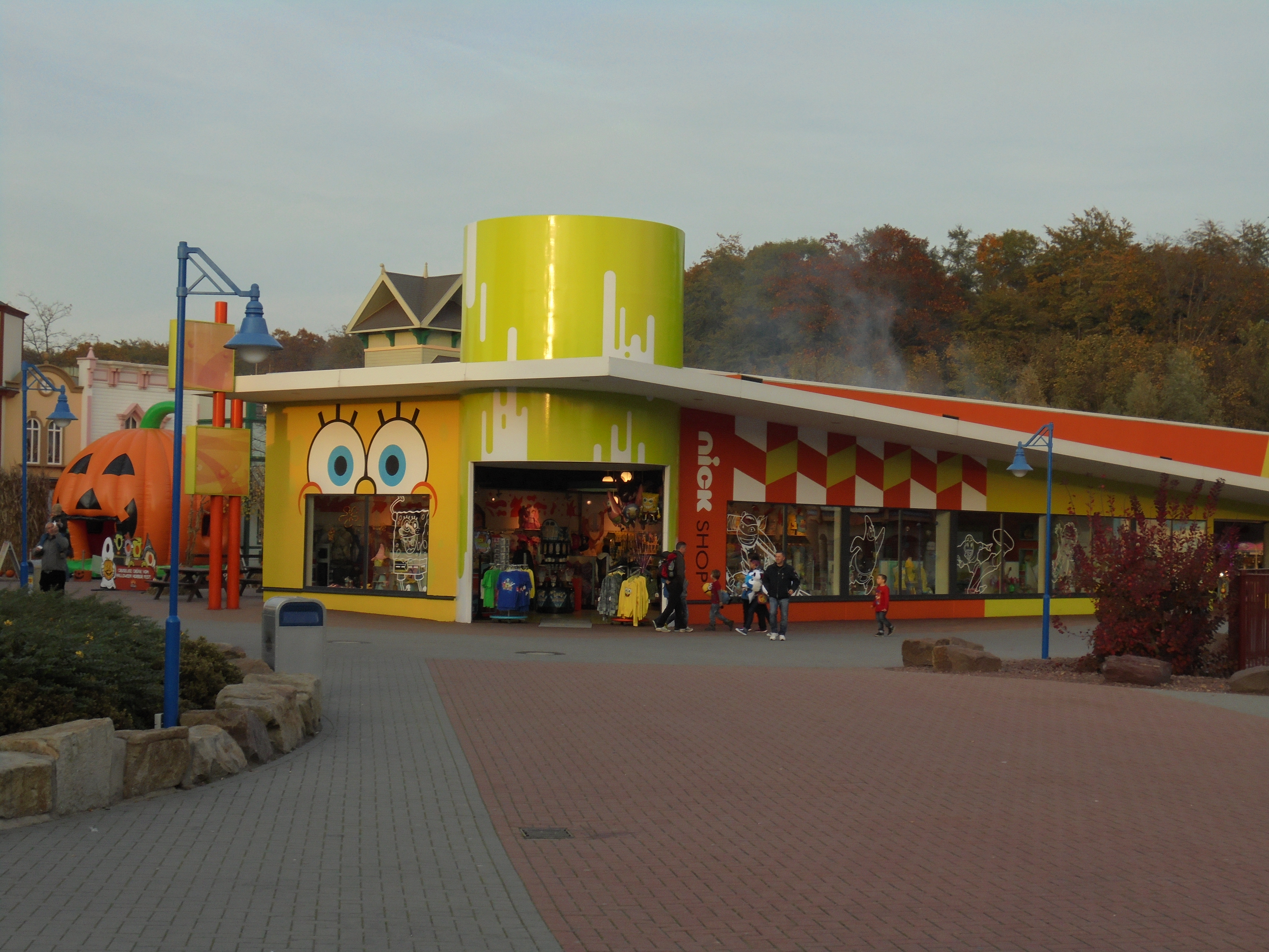 Shop Nickland